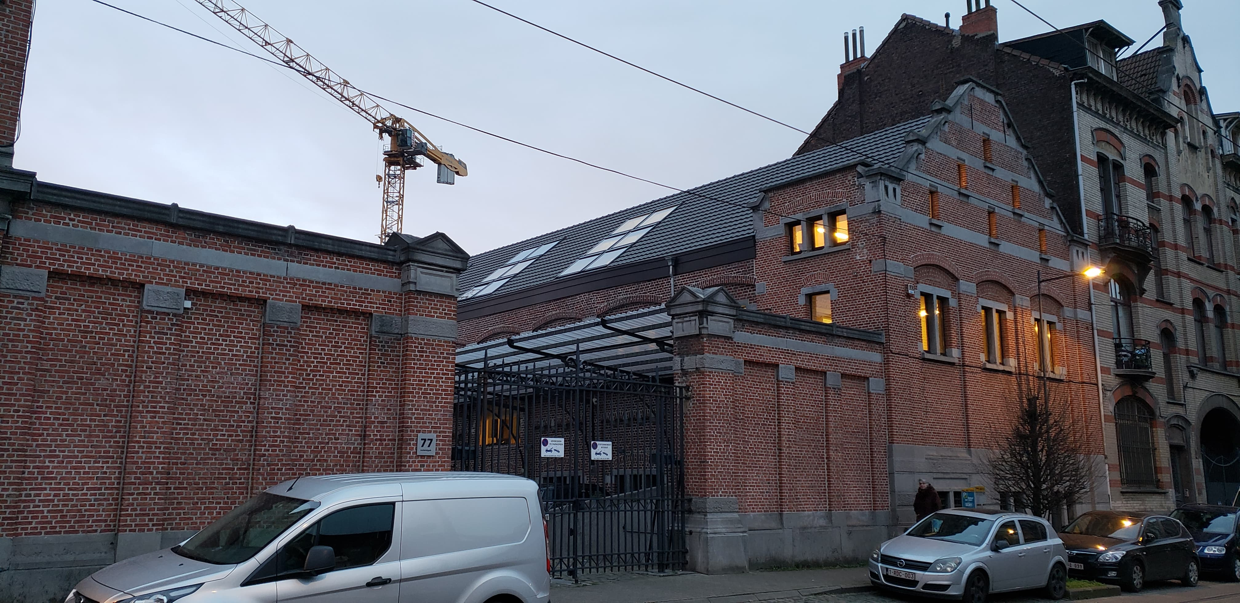 Ancien depot de brasserie et laiterie de Haecht